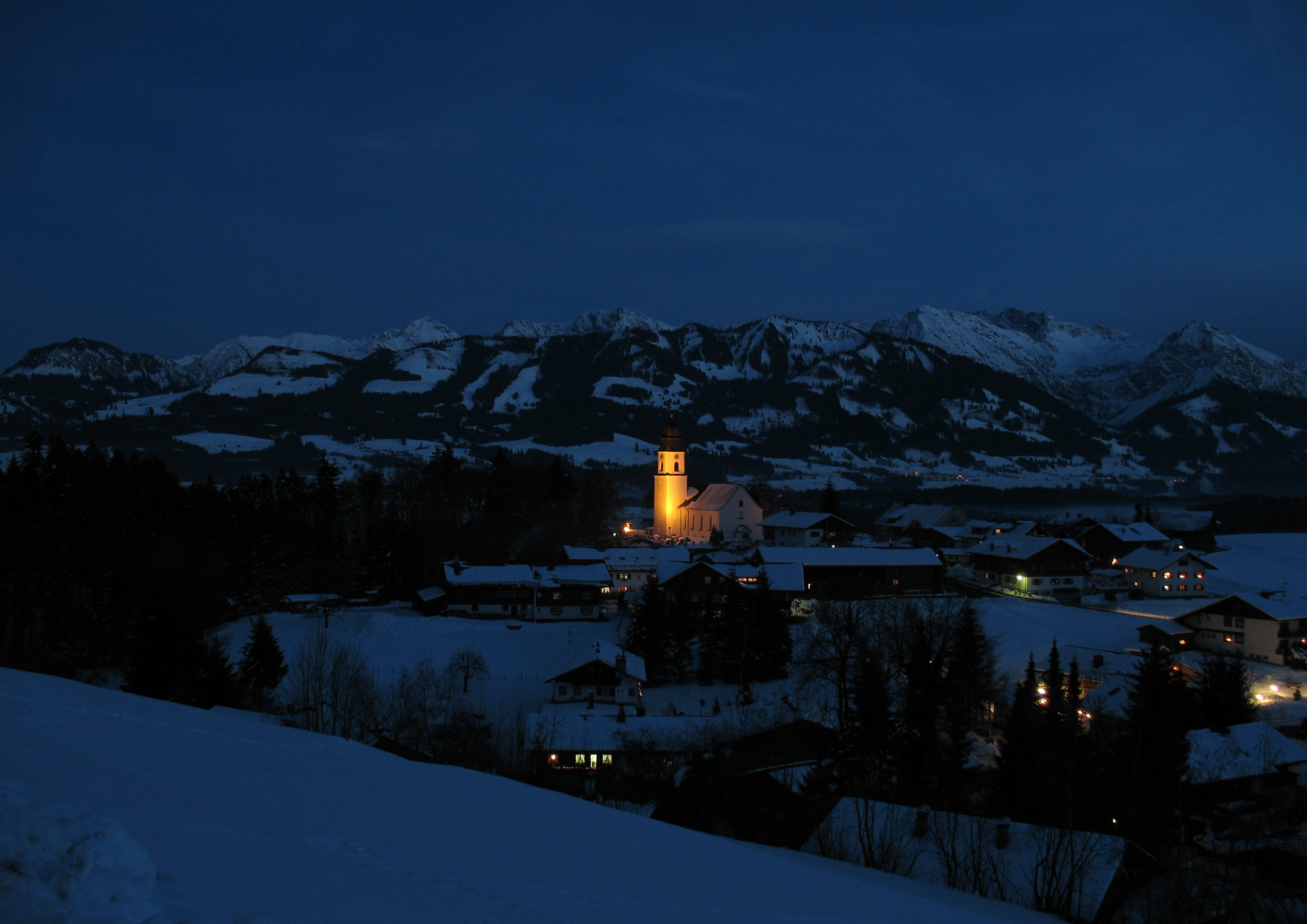 Abendstimmung in Ofterschwang mit Pfarrkirche St. Alexander, vom Parkplatz des Skiliftes aus gesehen.